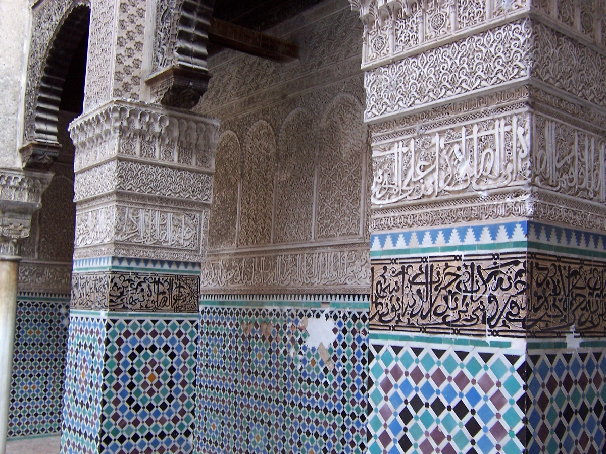 Fez, Morocco